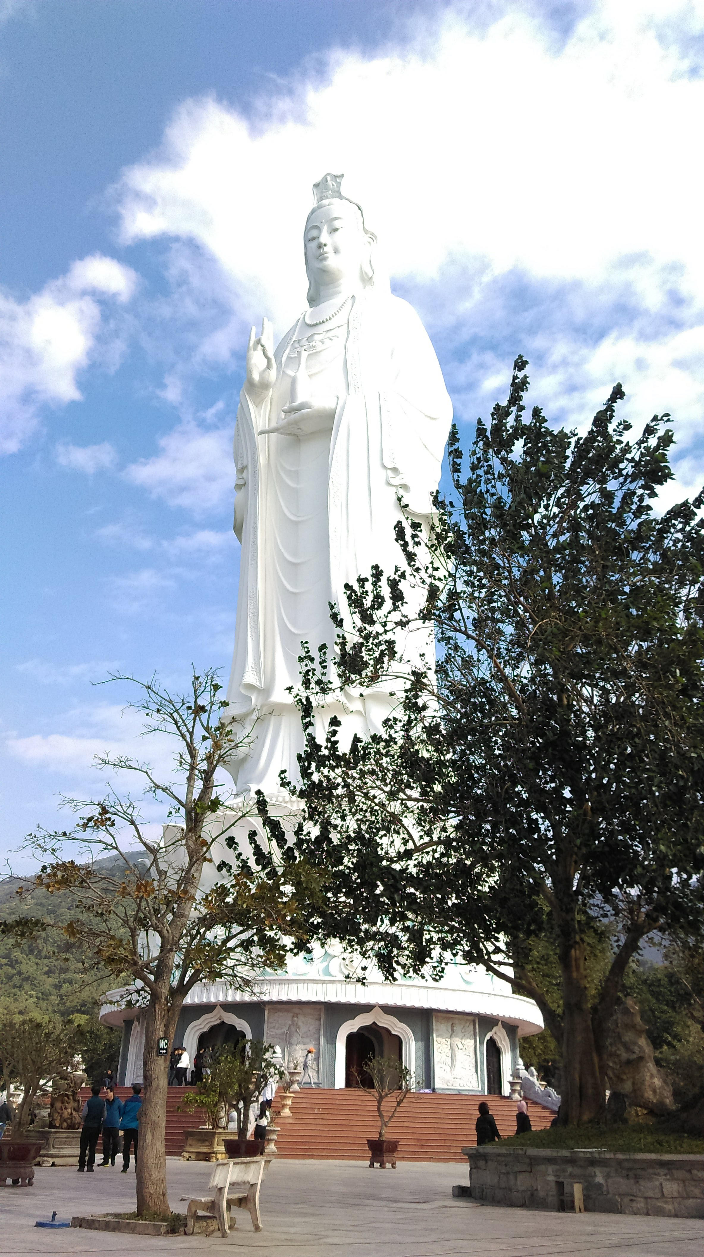 Chùa Linh Ứng, Sơn Trà, Đà Nẵng 2